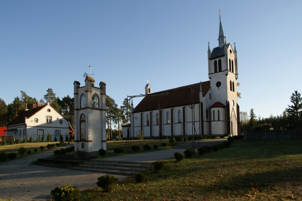 Lesiny Wielkie, kościół par. p.w. Niepokalanego Poczęcia NMP, 1856-1859